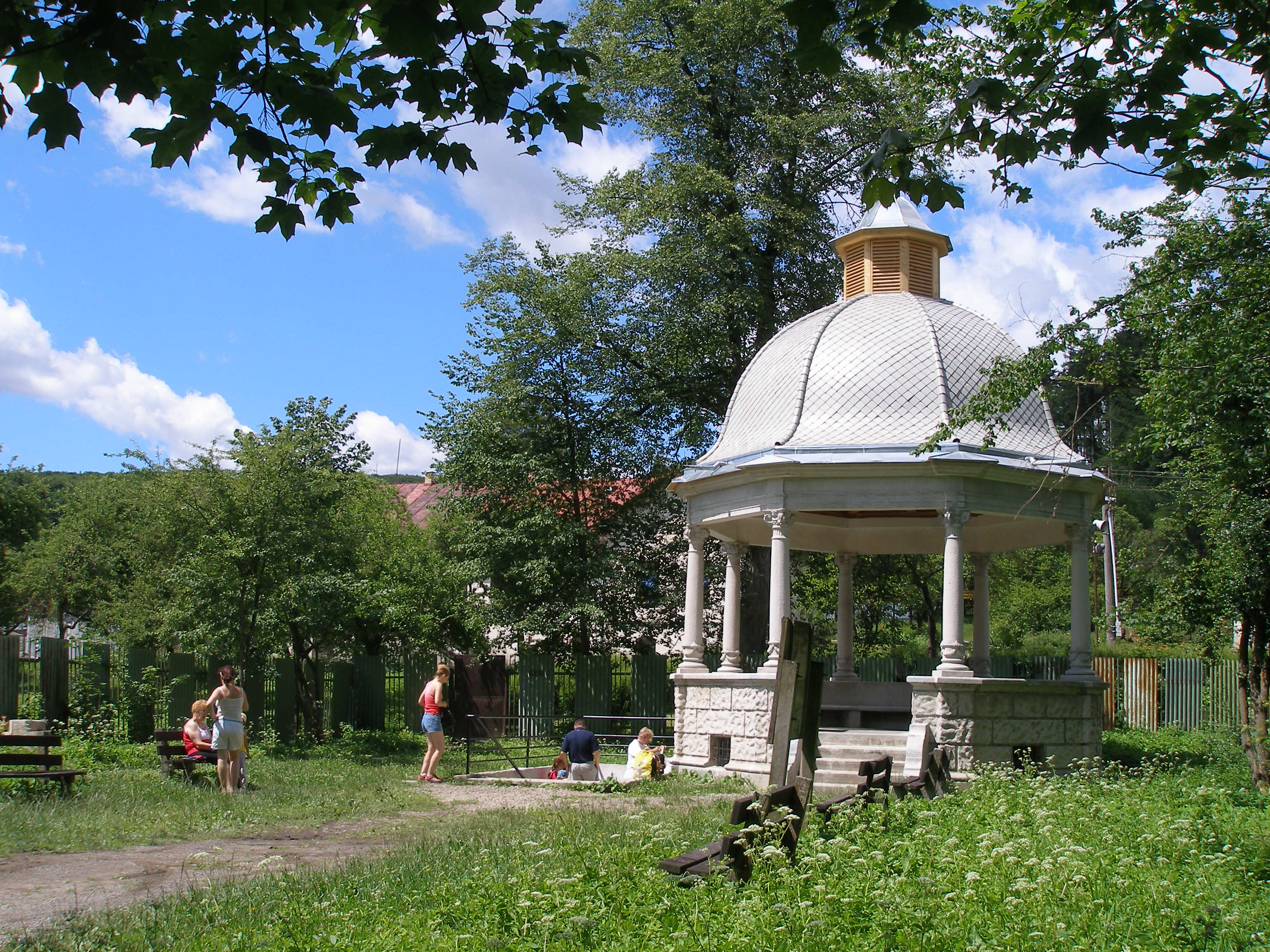 Cemjata, miestna časť Prešova, oddychová zóna, domov dôchodcov, región Šariš